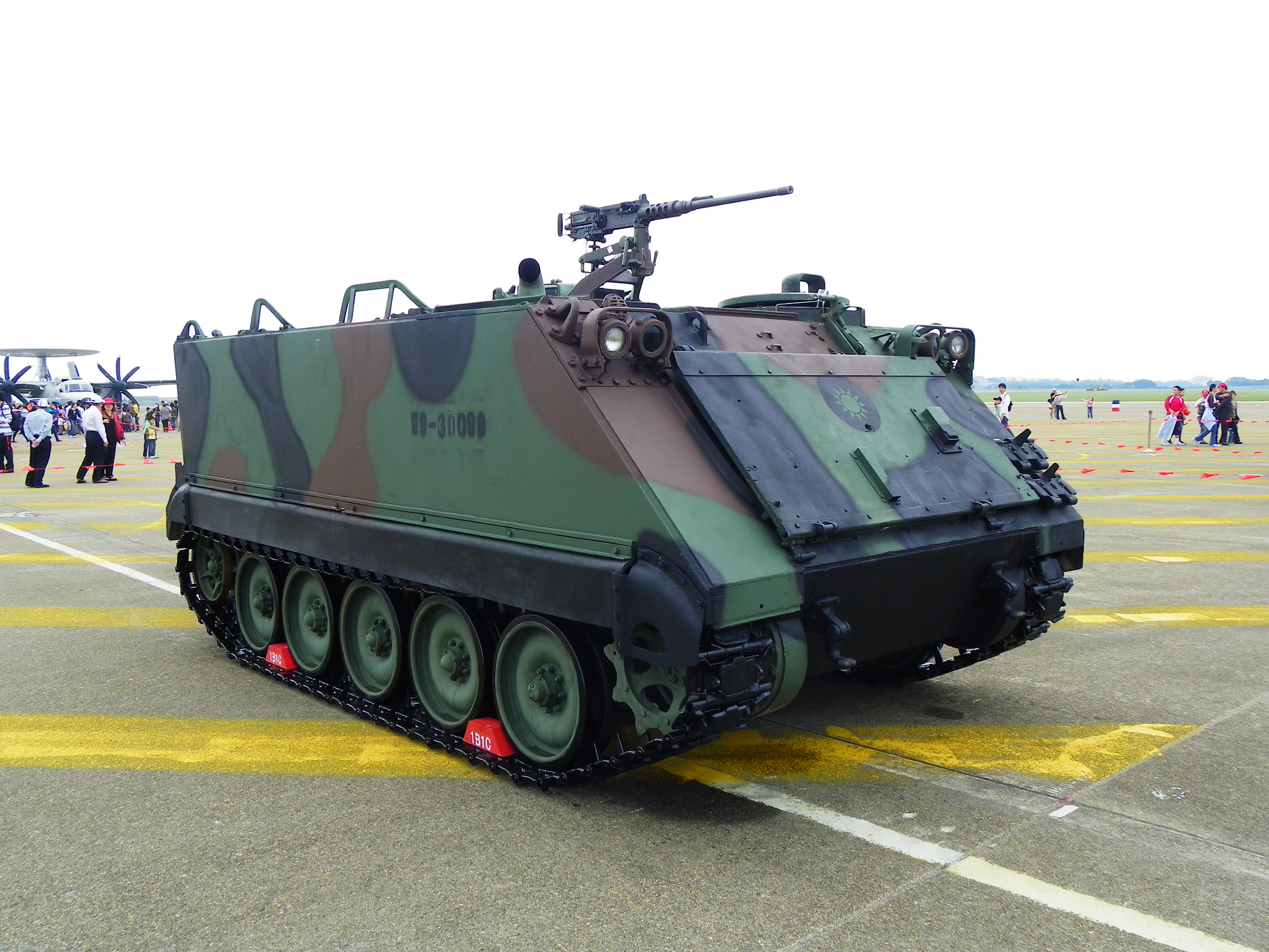 2011年清泉崗空軍基地營區開放活動，展示之中華民國陸軍M113裝甲運兵車。